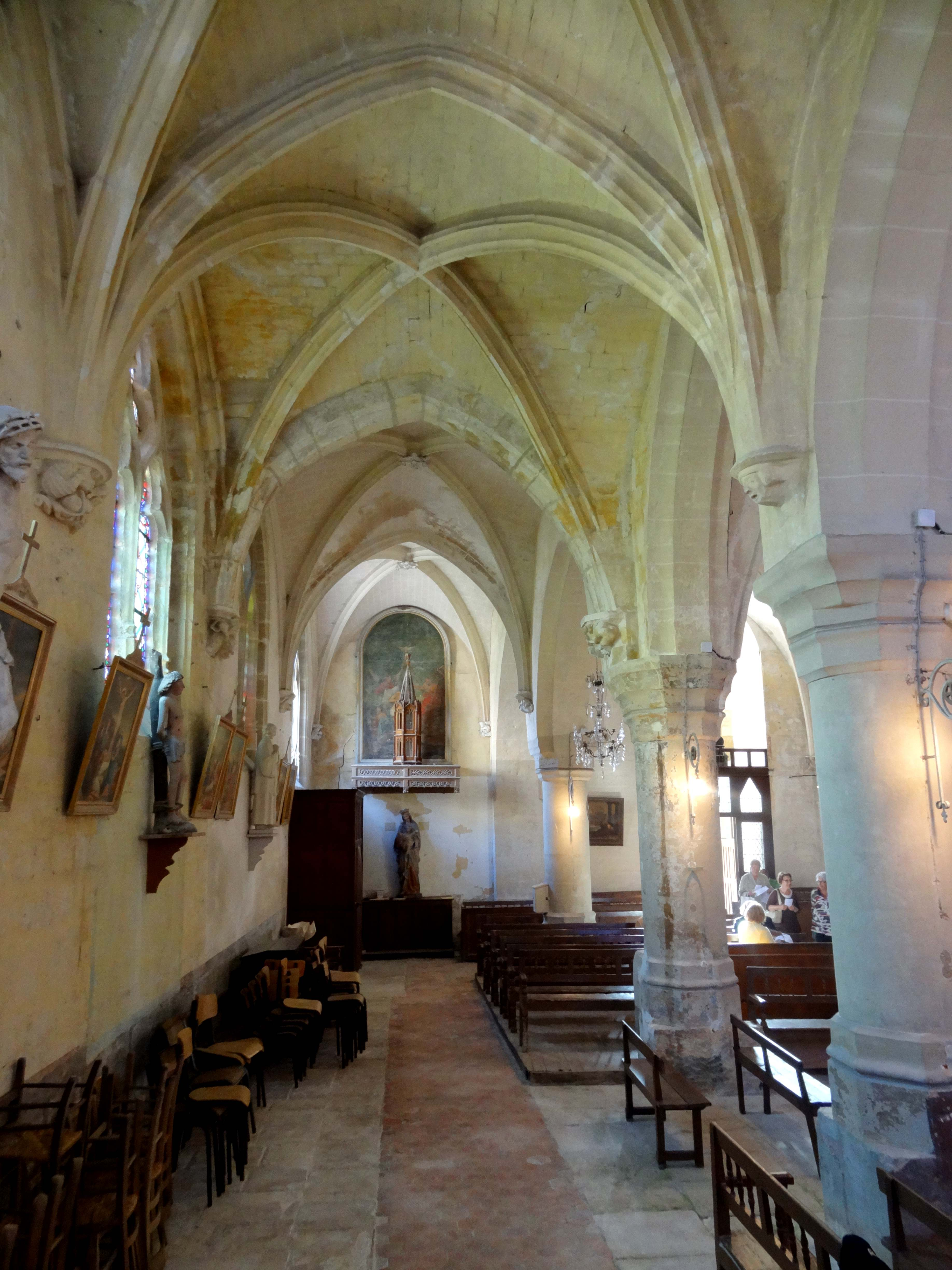 Intérieur de l'église - voir titre.